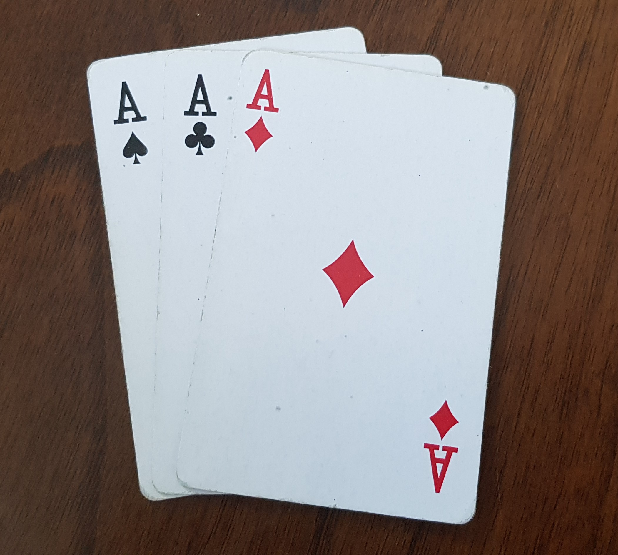 Chlust z trzech asów.